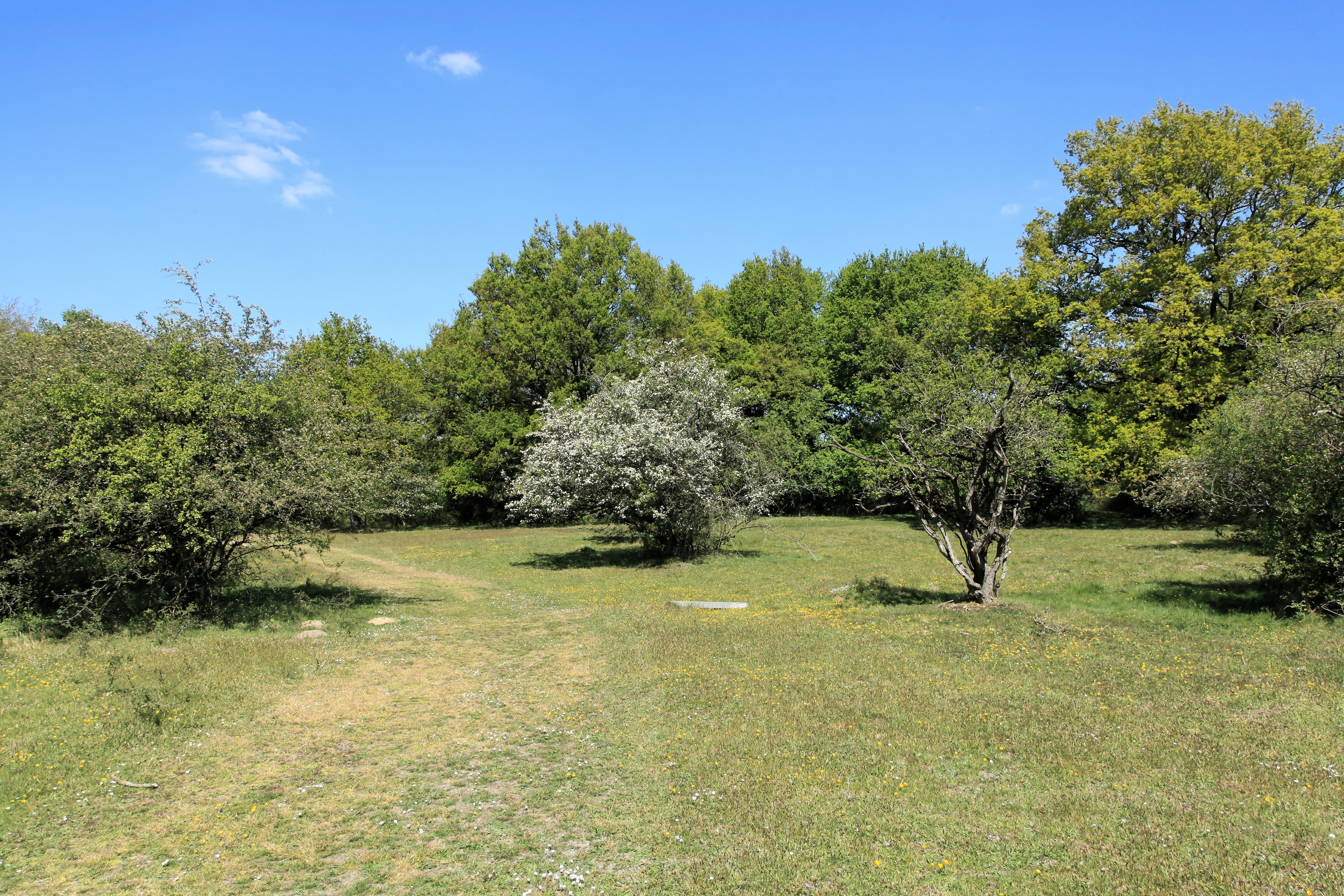 NSG Borkener Paradies in Meppen